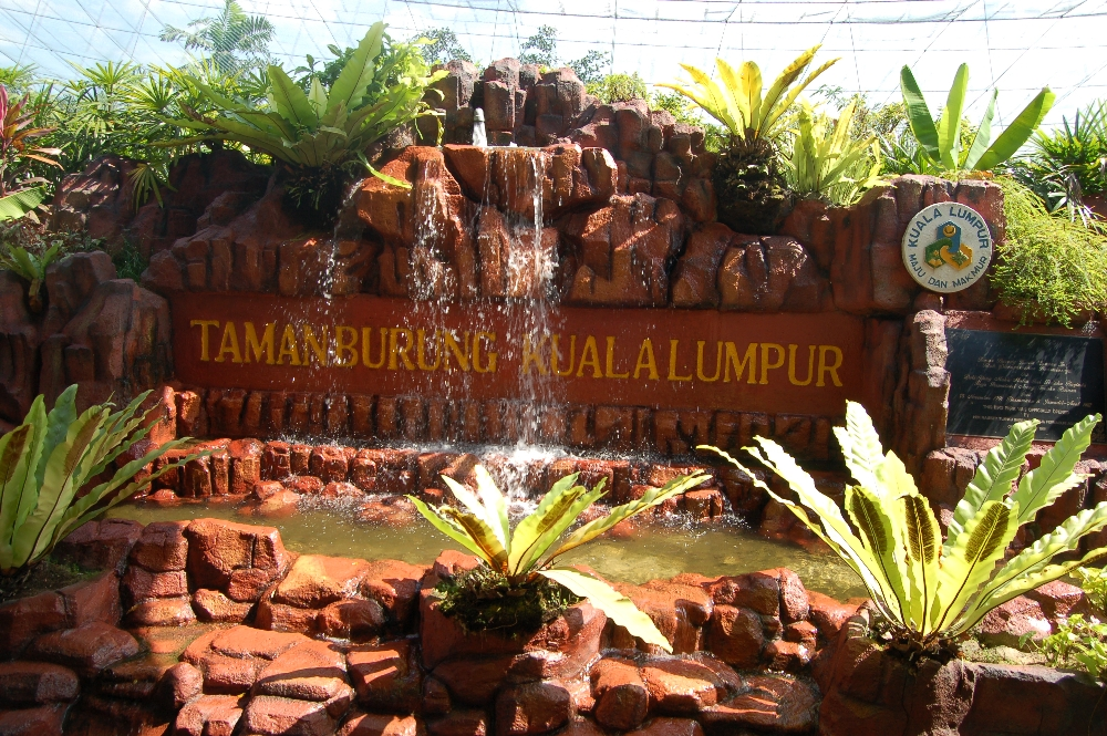 Taman Burung Kuala Lumpur, Malaysia